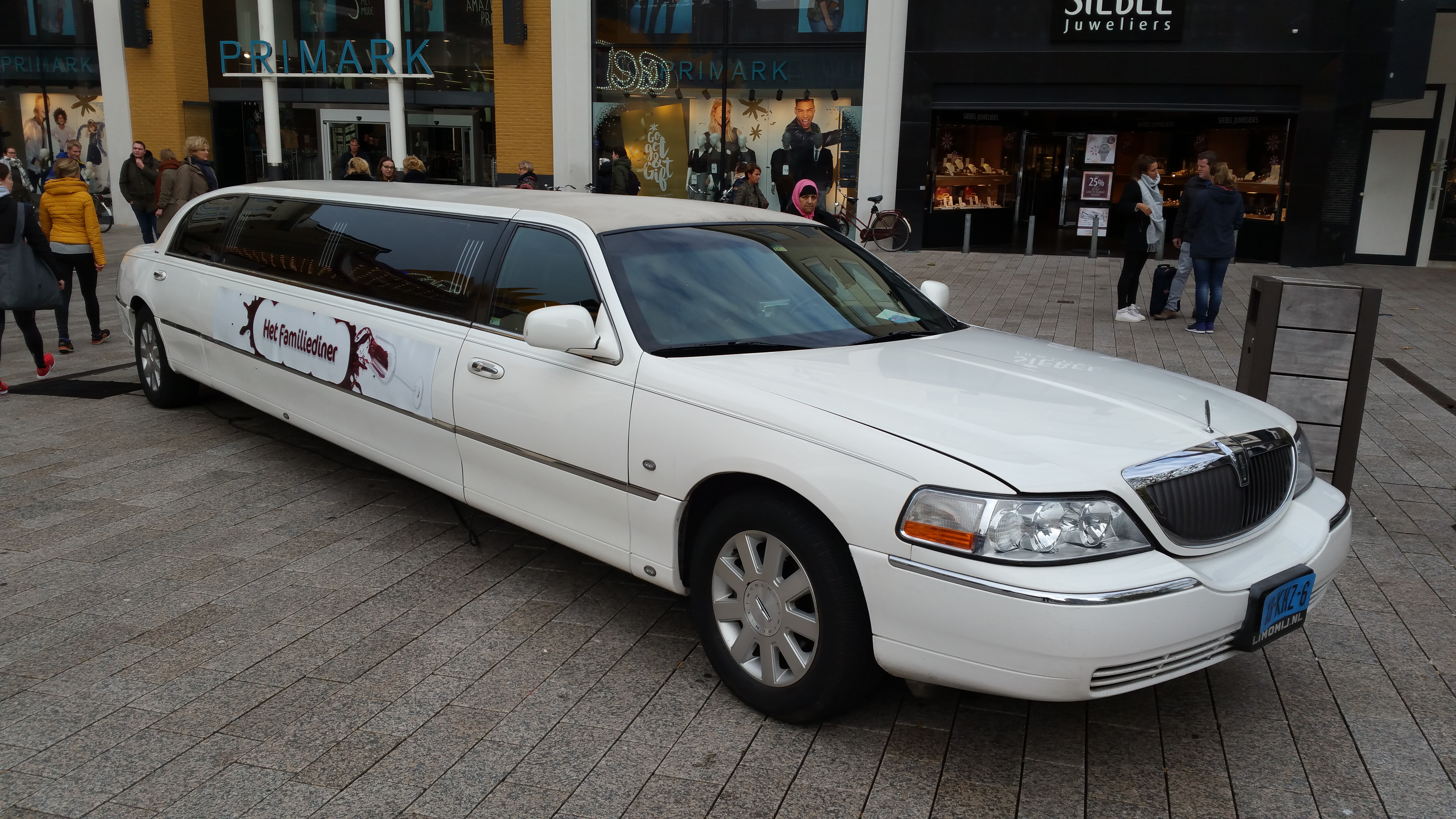 De limousine van het EO-programma Het Familiediner op Plein 1944 in Nijmegen